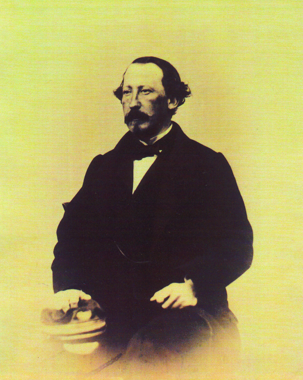 Positivo sobre cartulina, reportaje fotográfico sobre la construcción del ferrocarril de Santander a Alar del Rey (Palencia) Carlos Campuzano y Watkins (1820-1879) fue Ingeniero Ferroviario de la empresa constructora del ferrocarril cuando el Rey consorte Francisco de Asís Borbón visitó Santander para inaugurar las obras el 3 de mayo de 1852. La fotografía se tomó posteriormente en la fecha que se cita. Se encargó de construir las estaciones del ferrocarril entre Santander y Alar del Rey. También construyó el llamado "puente colgante" de Valladolid sobre el río Pisuerga, en 1860.